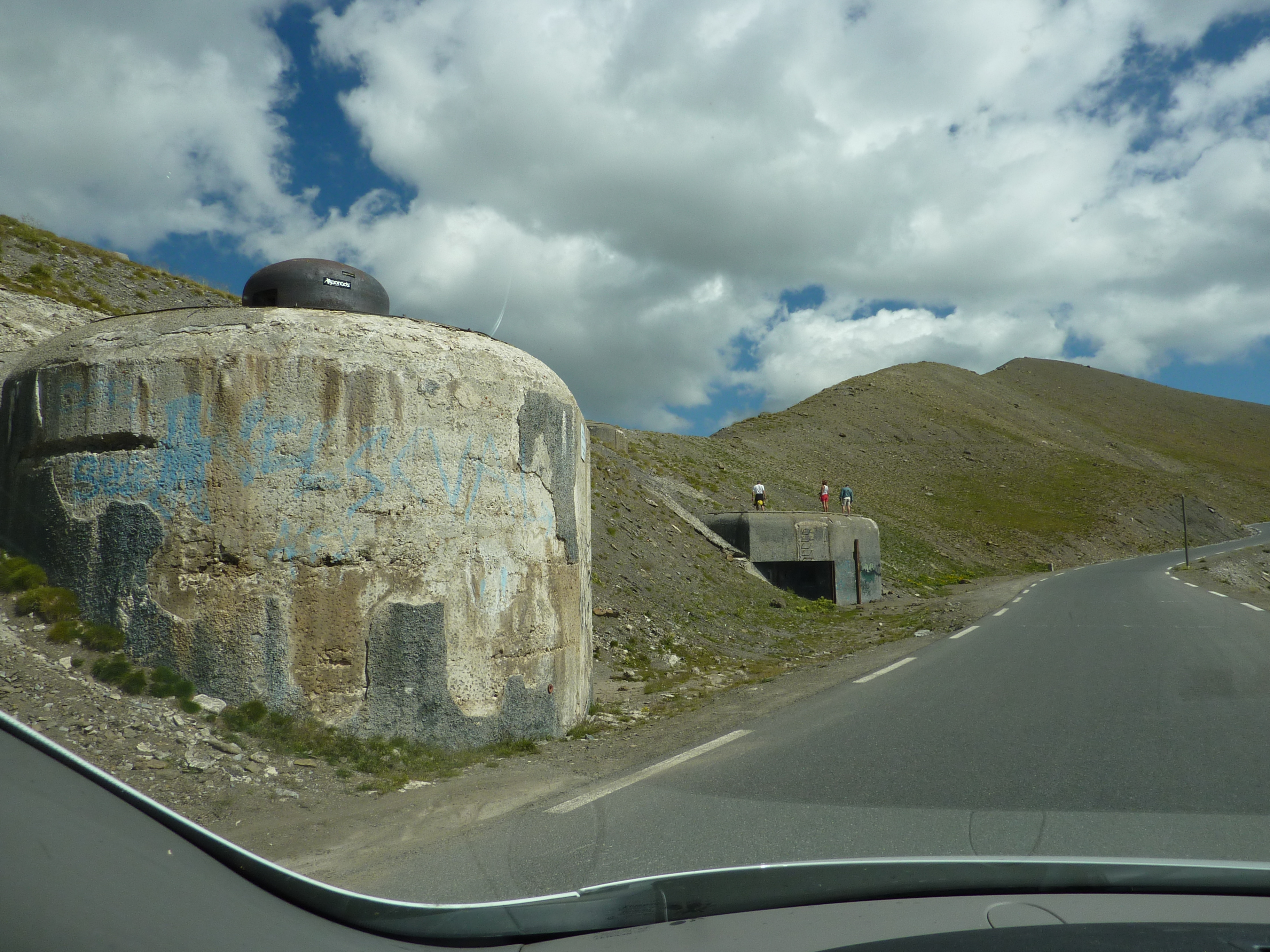 Ouvrage de Restefond avec ses deux casemates à 2680 mètres d'altitude- Département des Alpes de Haute-Provence (04) en FRANCE. Ouvrage de la ligne Maginot des Alpes sur le versant ouest de la cime de la Bonette (2860 m) en bordure, aujourd'hui de la route D 64.